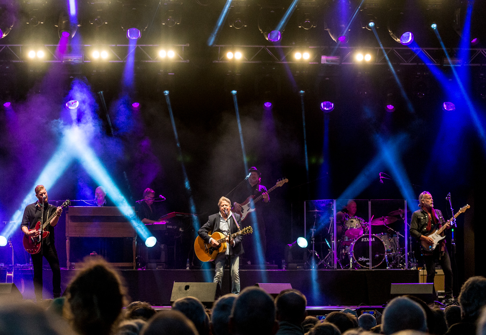 Sven-Ingvars uppträder inför en fulltalig publik på Gröna Lund i Stockholm den 12 augusti 2016. Oscar Magnusson, Sven-Erik Magnusson och Staffan Enestam på gitarr. Thommy Gustafsson på keyboard. Klas Anderhell på trummor.